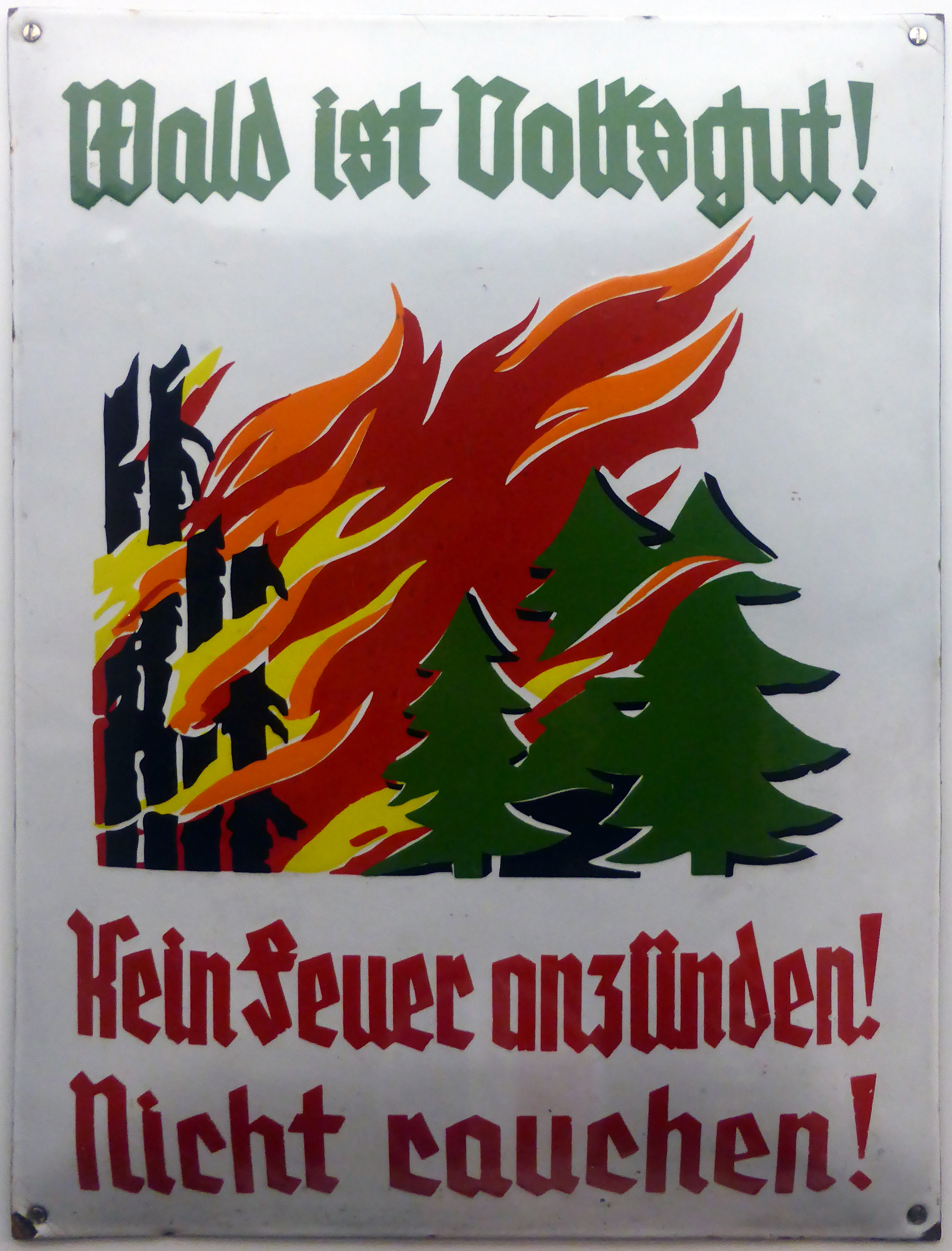 Email-Schild Wald ist Volksgut; Kein Feuer anzünden!; Nicht rauchen! um 1940. Ausgestellt im Museum sächsisch-böhmisches Erzgebirge in Marienberg.